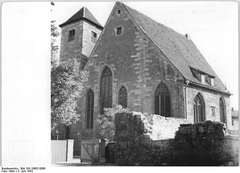 Erfurt, Michaeli-Kirche Zentralbild Klein-3.6.1955 Ra-Ho.- Schöne deutsche Heimat - Erfurt pflegt sein Kulturerbe. Für Wiederherstellungs- und Instandsetzungsarbeiten an den kirchlichen Baudenkmälern der drei Bezirke Gera, Erfurt und Suhl wurden aus staatlichen Mitteln 400.000 DM für das Jahr 1953 zur Verfügung gestellt. UBz: Die wieder instand gesetzte Michaeli-Kirche in Erfurt. Information added by Wikimedia users.Die Reste des zerstörten "Collegium Maius" (im Bildvordergrund) vor der "Michaeliskirche" in Erfurt.